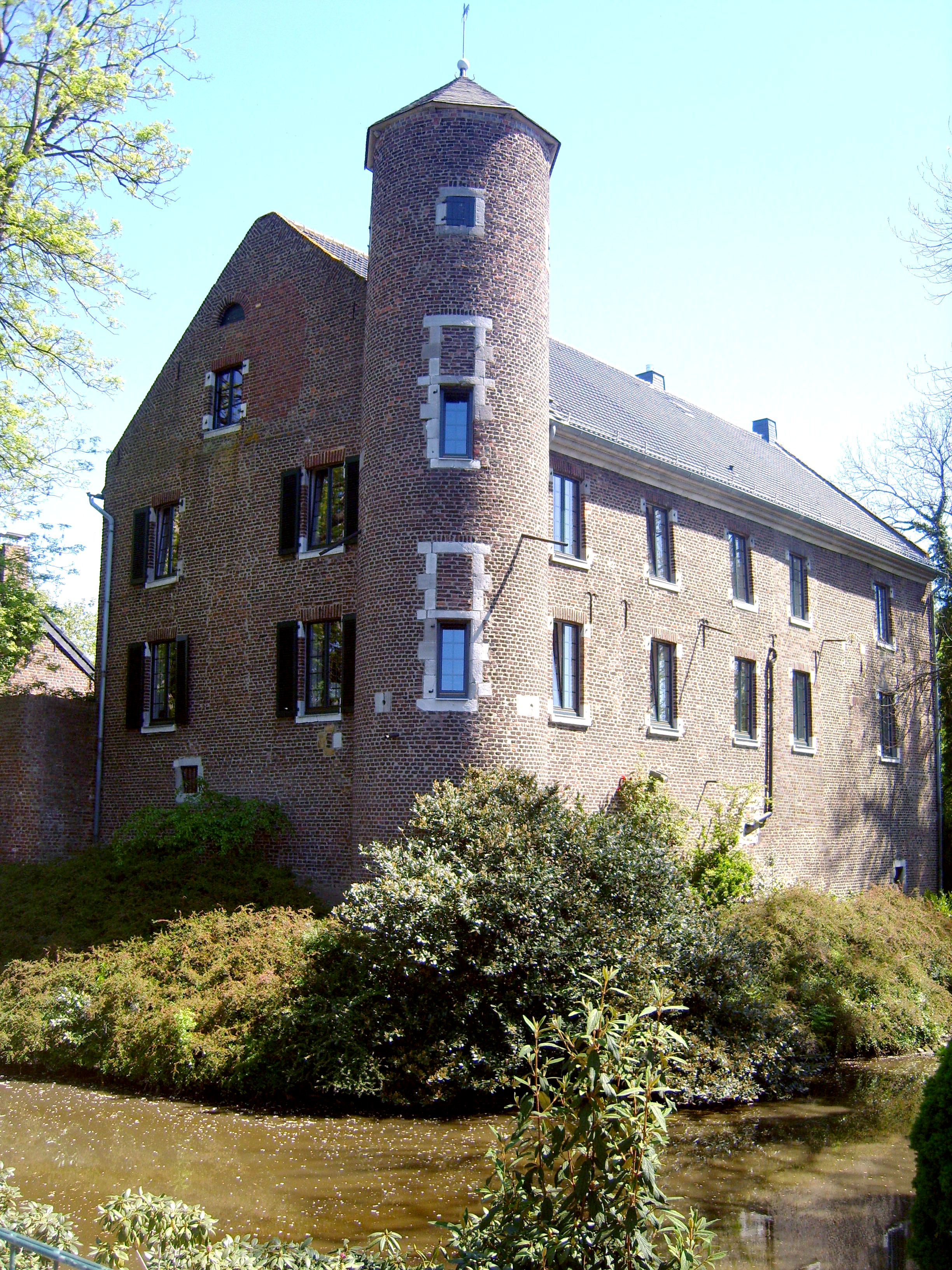 Burg Dürboslar in Dürboslar